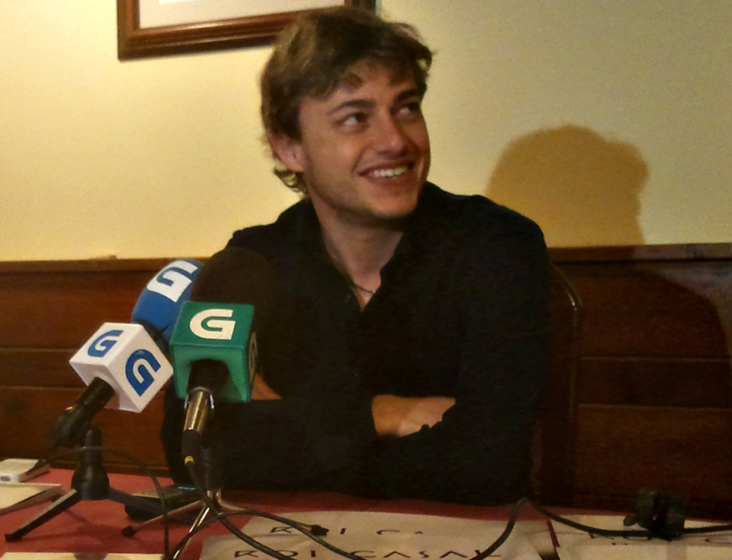 Roi Casal na presentación do seu último disco, Donos do noso destino, en Santiago de Compostela. Data da presentación 25-3-2014.